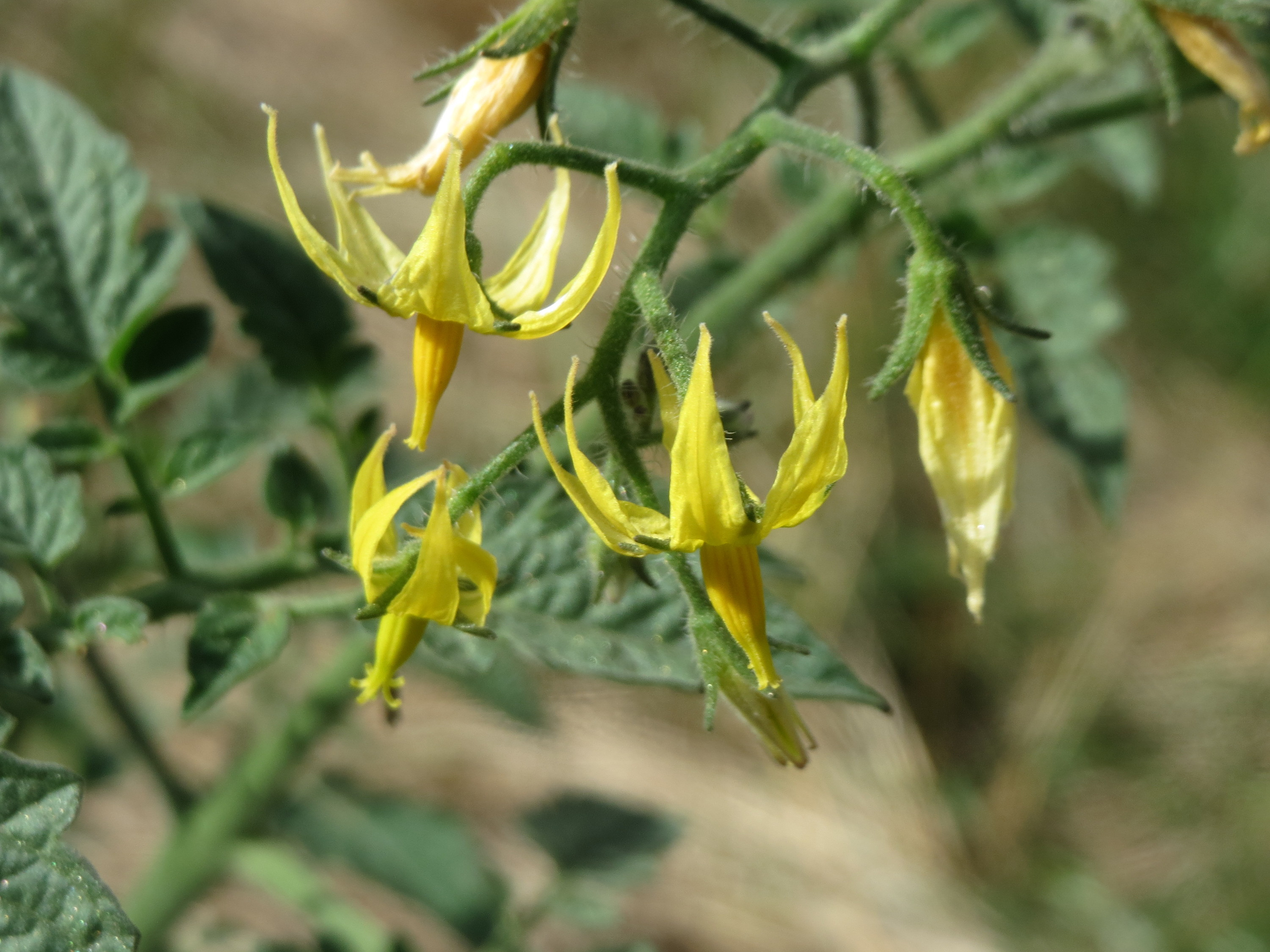 Verwilderte Tomate (Solanum lycopersicum) an einer Ruderalstelle in der Berlinallee in Hockenheim